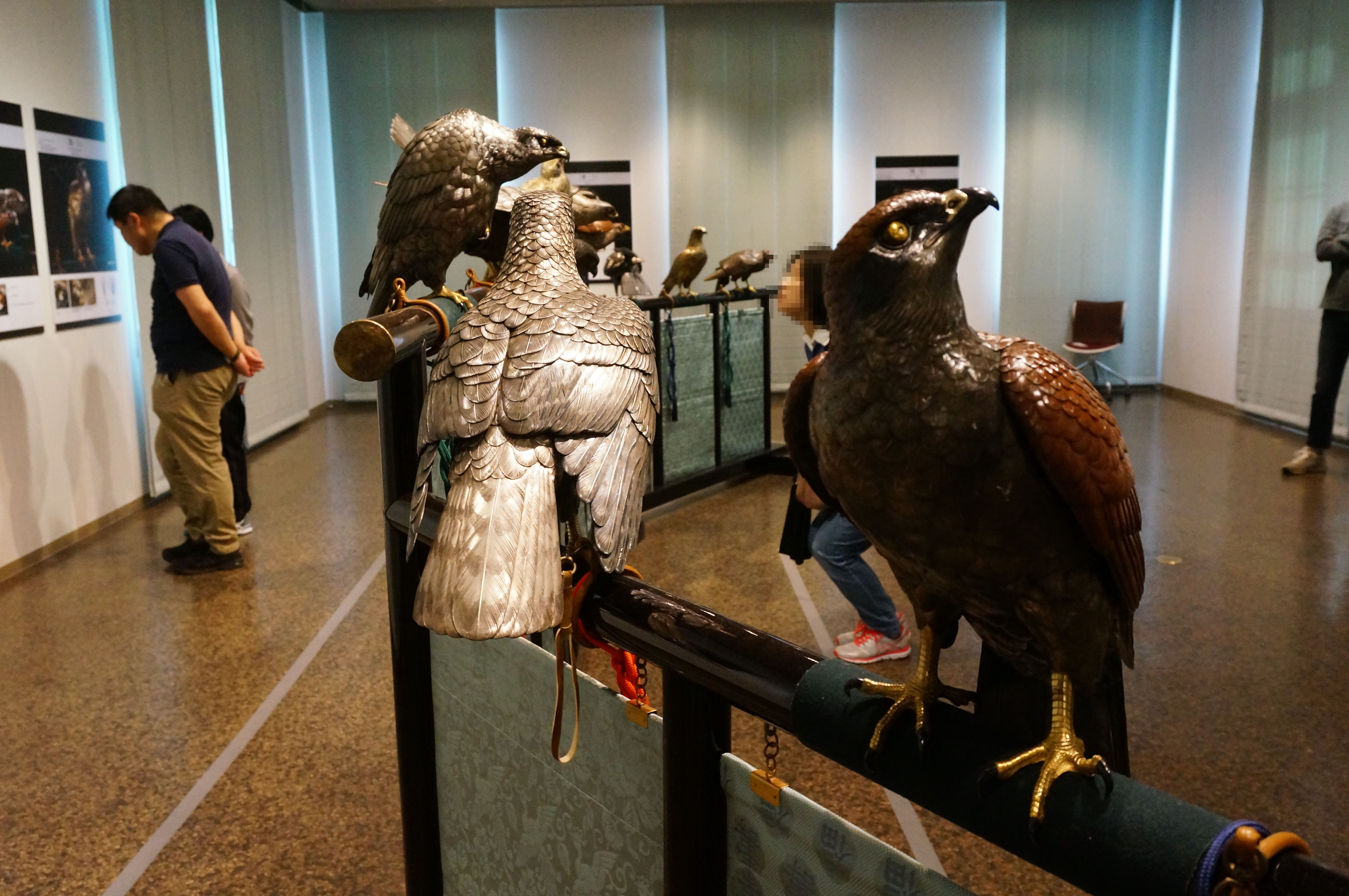 東京国立近代美術館工芸館「名工の明治」展にて